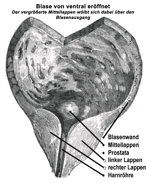 Blase von ventral mit dtl. vergrößertem Mittellappen